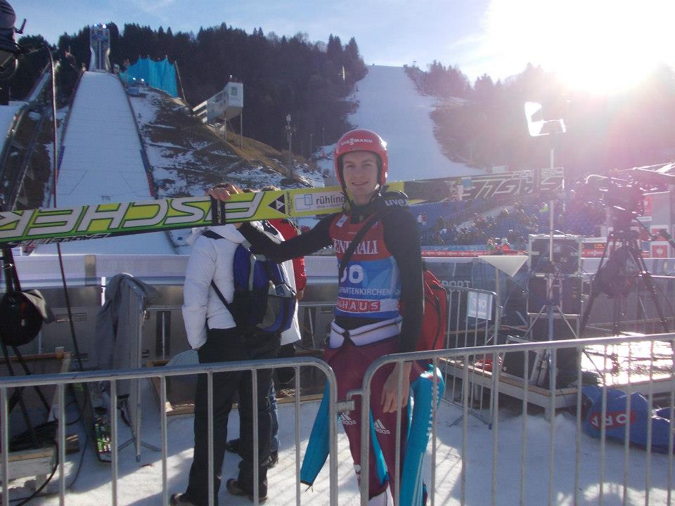 Der Skispringer Danny Queck in Garmisch-Partenkirchen